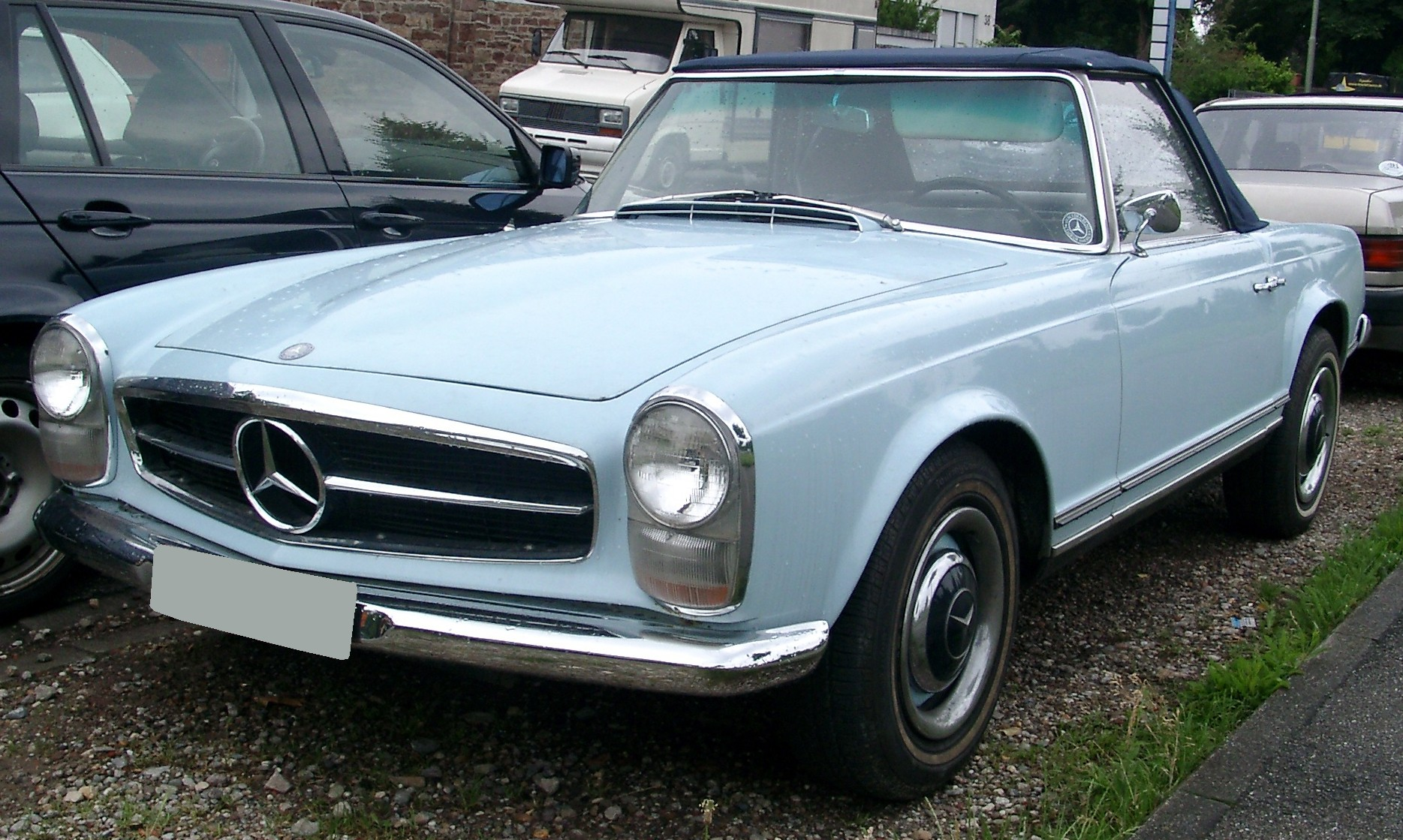 Mercedes-Benz W113